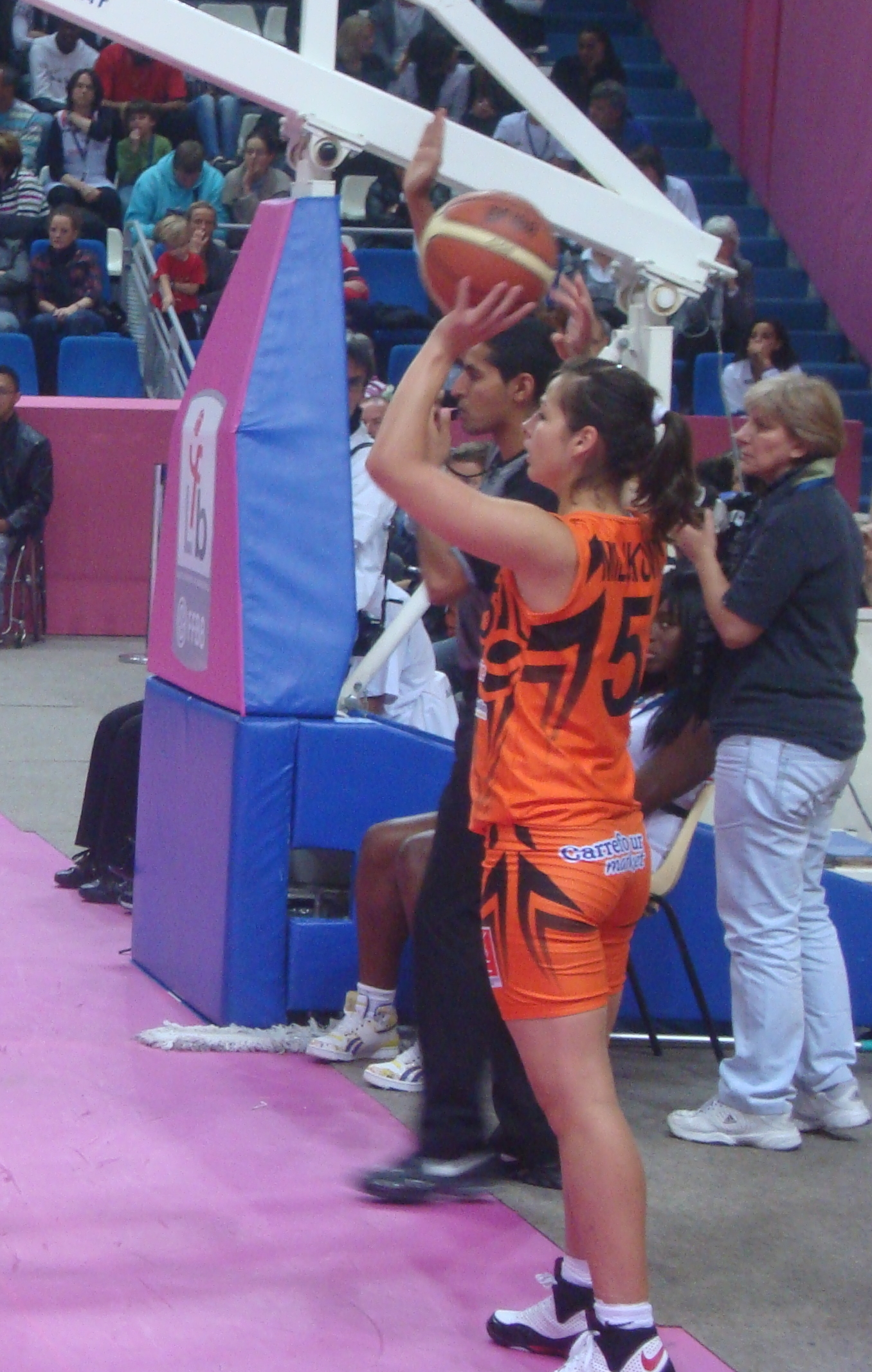 La joueuse de basket-ball serbe Maja Miljkovic sous le maillot de Bourges